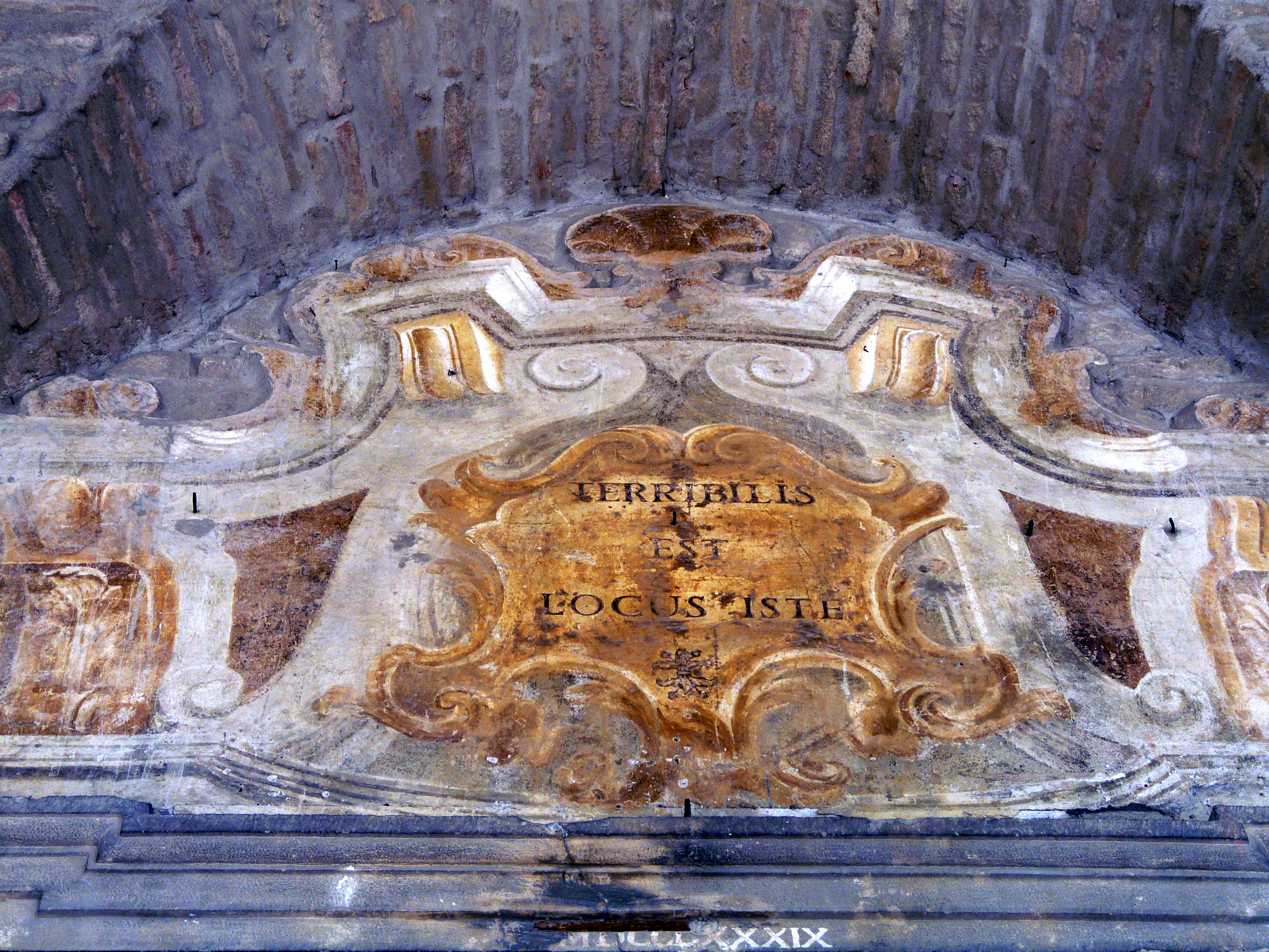 Immagini dell'abbazia di San Colombano di Bobbio, Emilia-Romagna, Italia